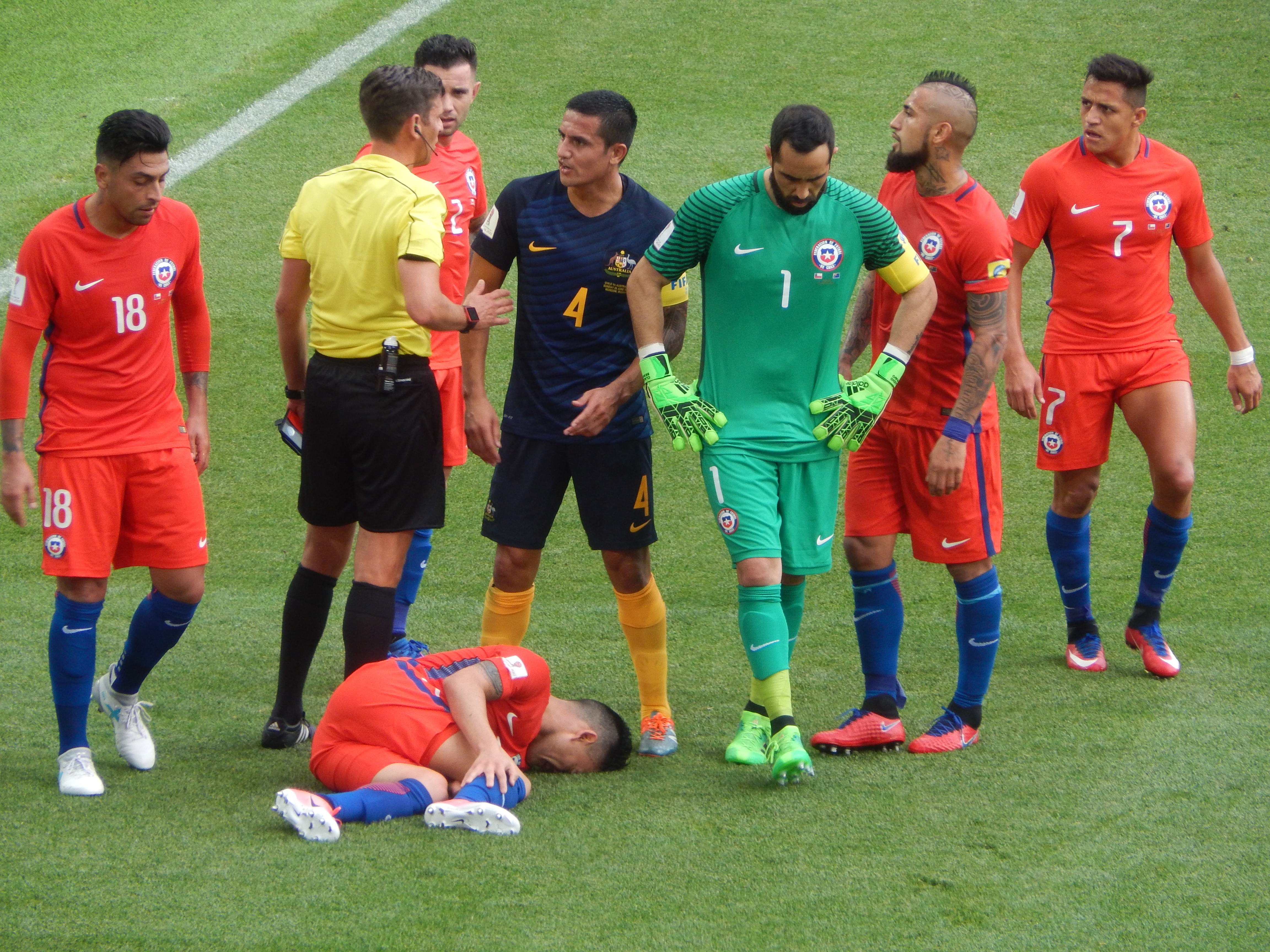 Матч Чили – Австралия